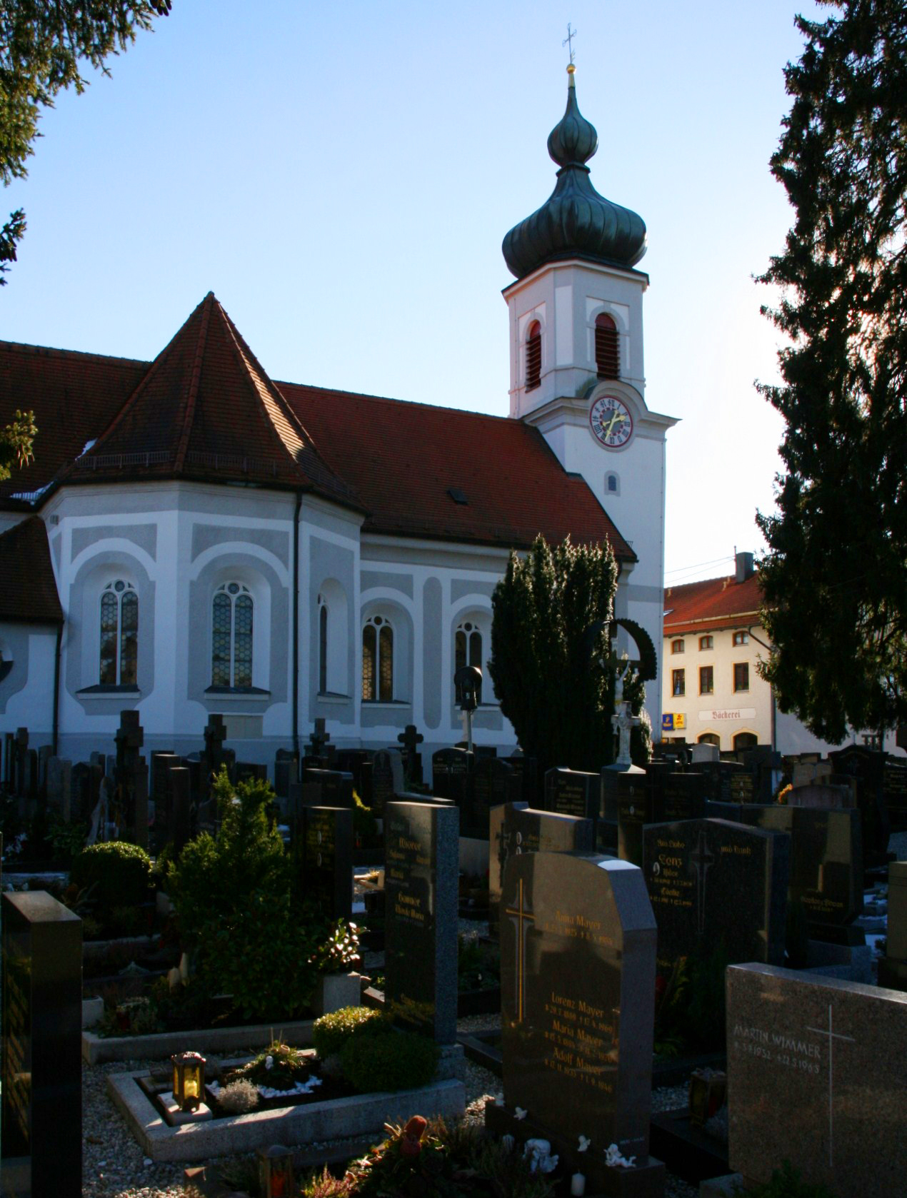 Die katholische Pfarrkirche St. Agatha in Maitenbeth (Landkreis Mühldorf am Inn, Oberbayern). Die barocke Saalkirche mit Turm auf der Vorderseite, einschiffigem Langhaus, Vierung und Chor wurde ab 1680 in die vorliegende Gestalt gebracht.